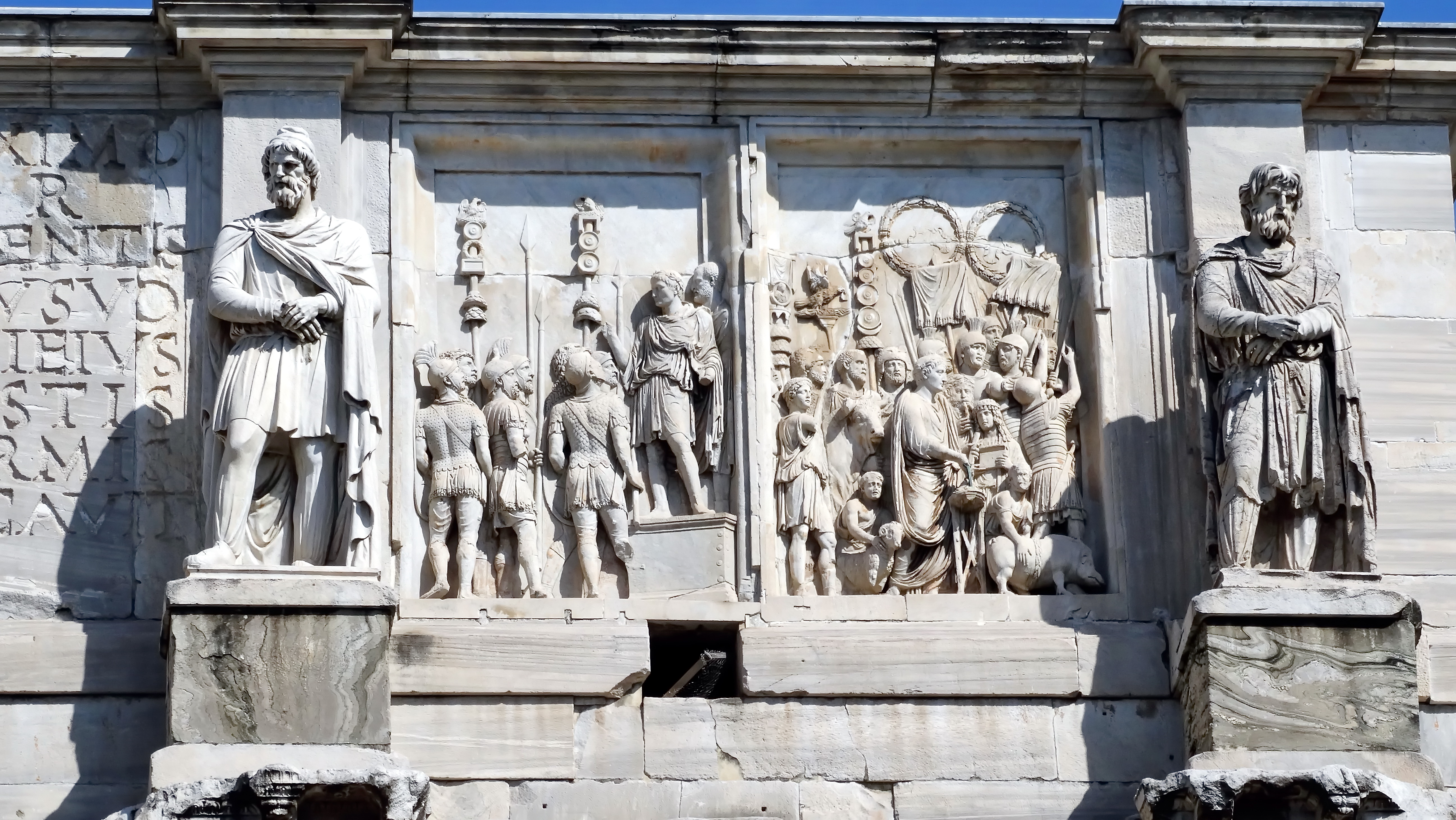 Arco di Costantino, ricostruzione del 315 d.c. su precedente arco dell'epoca di Adriano, Pannelli di Marco Aurelio 173 d.c., Sulle colonne statue di daci di epoca Traianea.